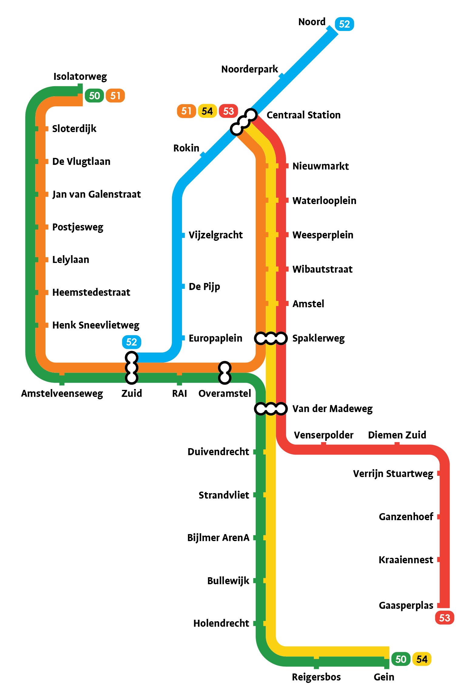 Metro Amsterdam